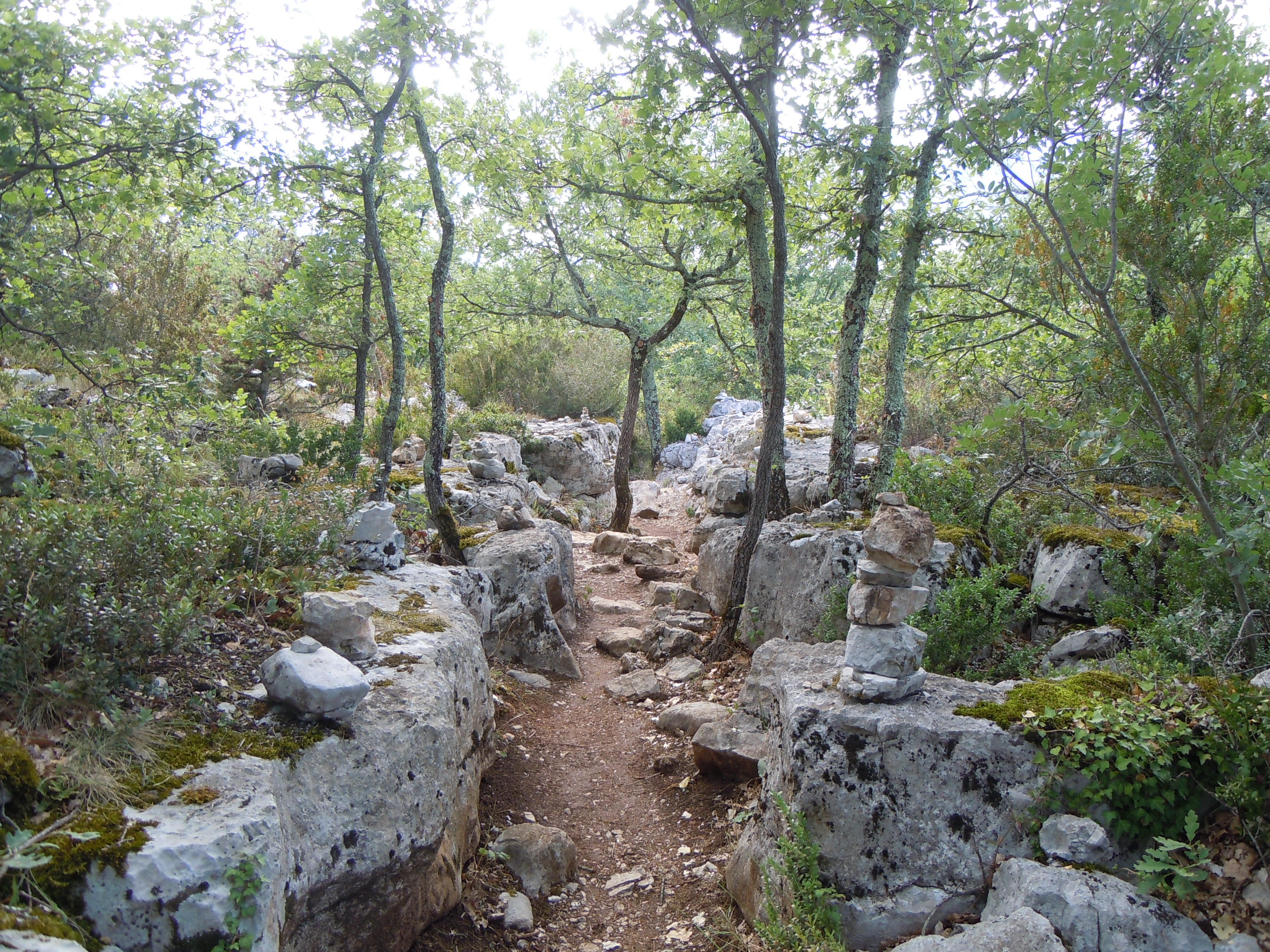 Bois de Païolive - chemins bordés de murets - Ardèche - France